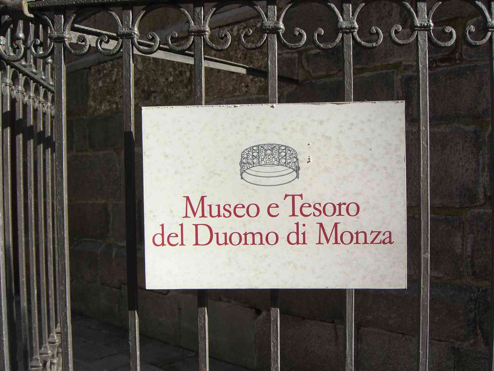 MB Monza targa all'ingresso del Museo e Tesoro del Duomo di Monza